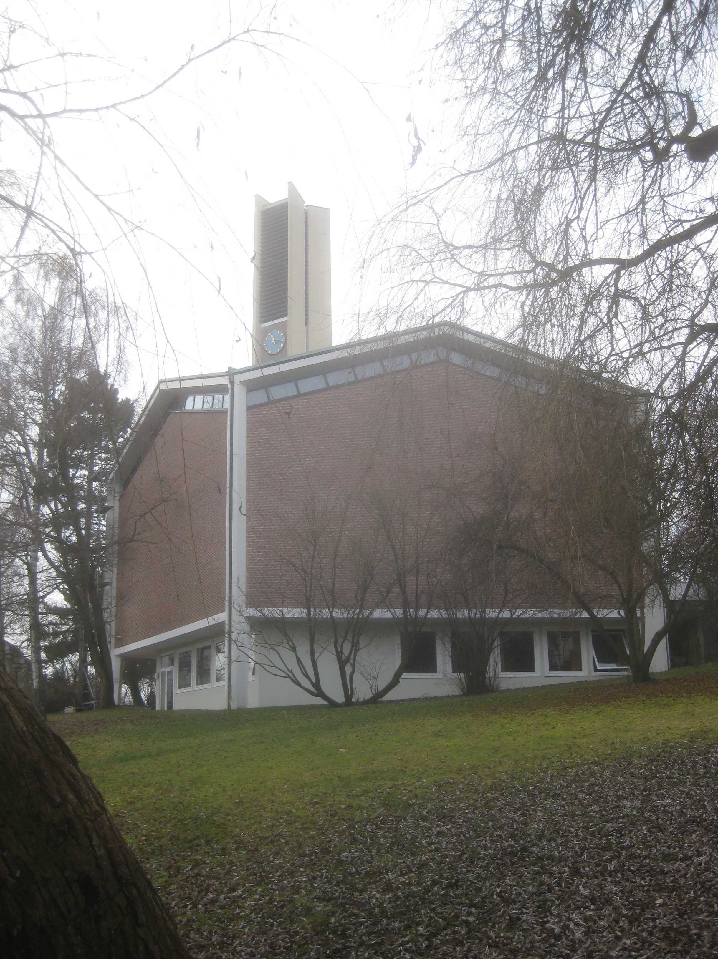 Evangelische Christuskirche, Sindelfingen, Vordere Halde 23. Architekten: Rall und Röper (Heinz Rall und Hans Röper). Mitarbeit: Erwin Riexinger. Einweihung: 1959.